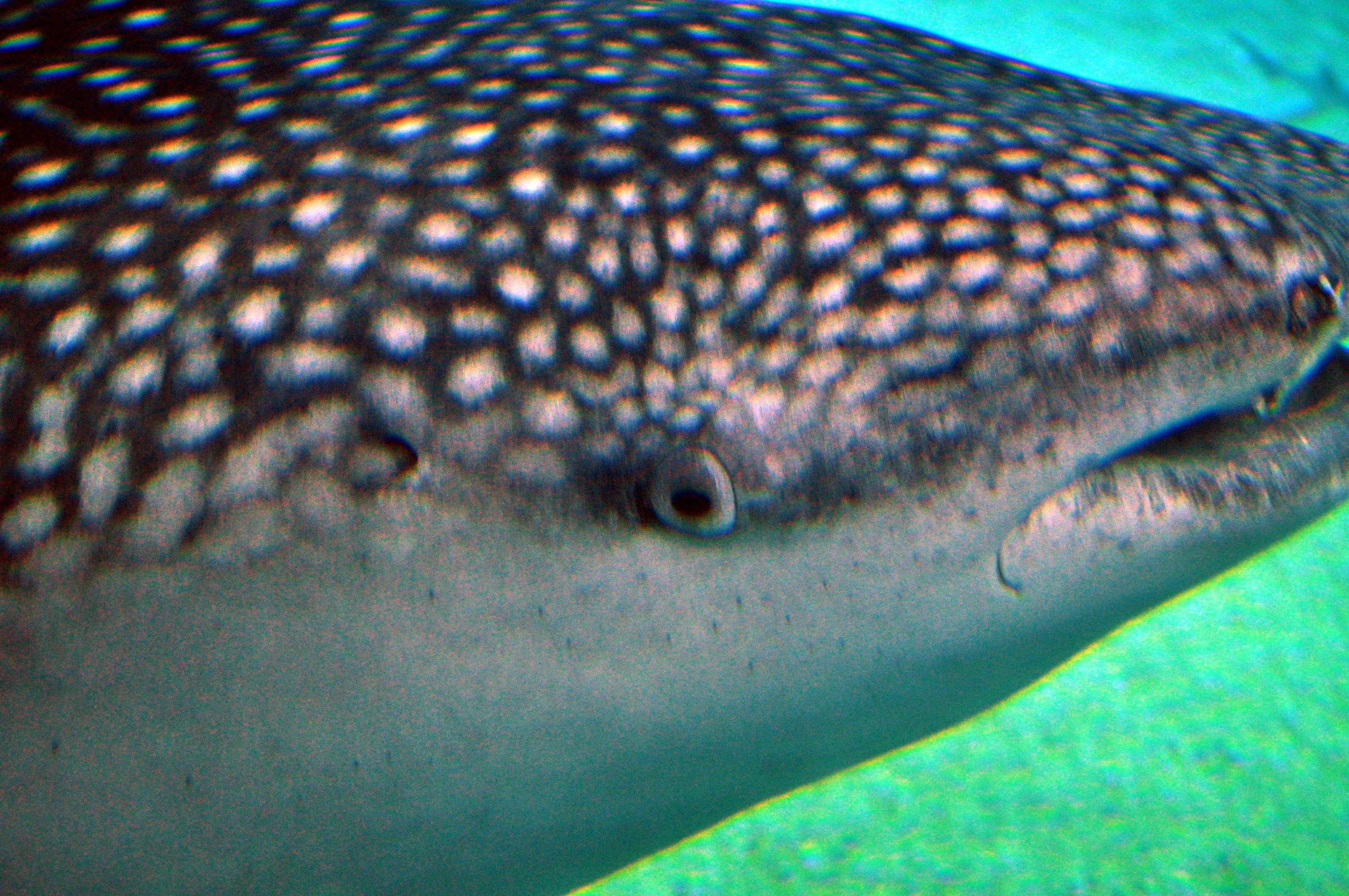 Gros plan sur l'œil et le spiracle droit du requin-baleine (aquarium Kaiyukan d'Osaka)